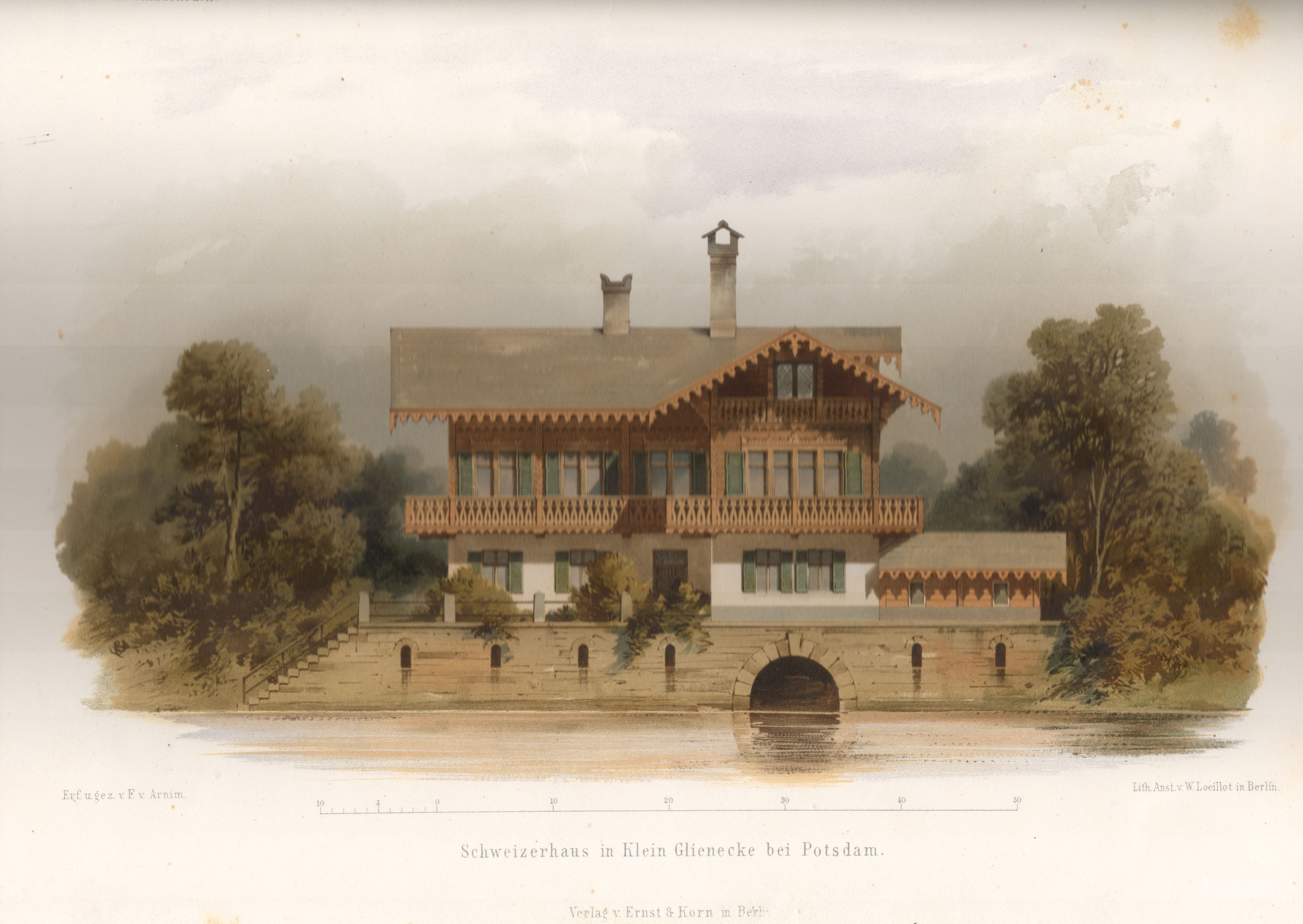 Berlin, Klein Glienicke, Schweizerhaus von Ferdinand von Arnim